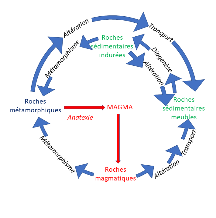 Il s'agit de l'origine très schématique des roches.Inspiré de Walter Schumann "Guide des Pierres et Minéraux"